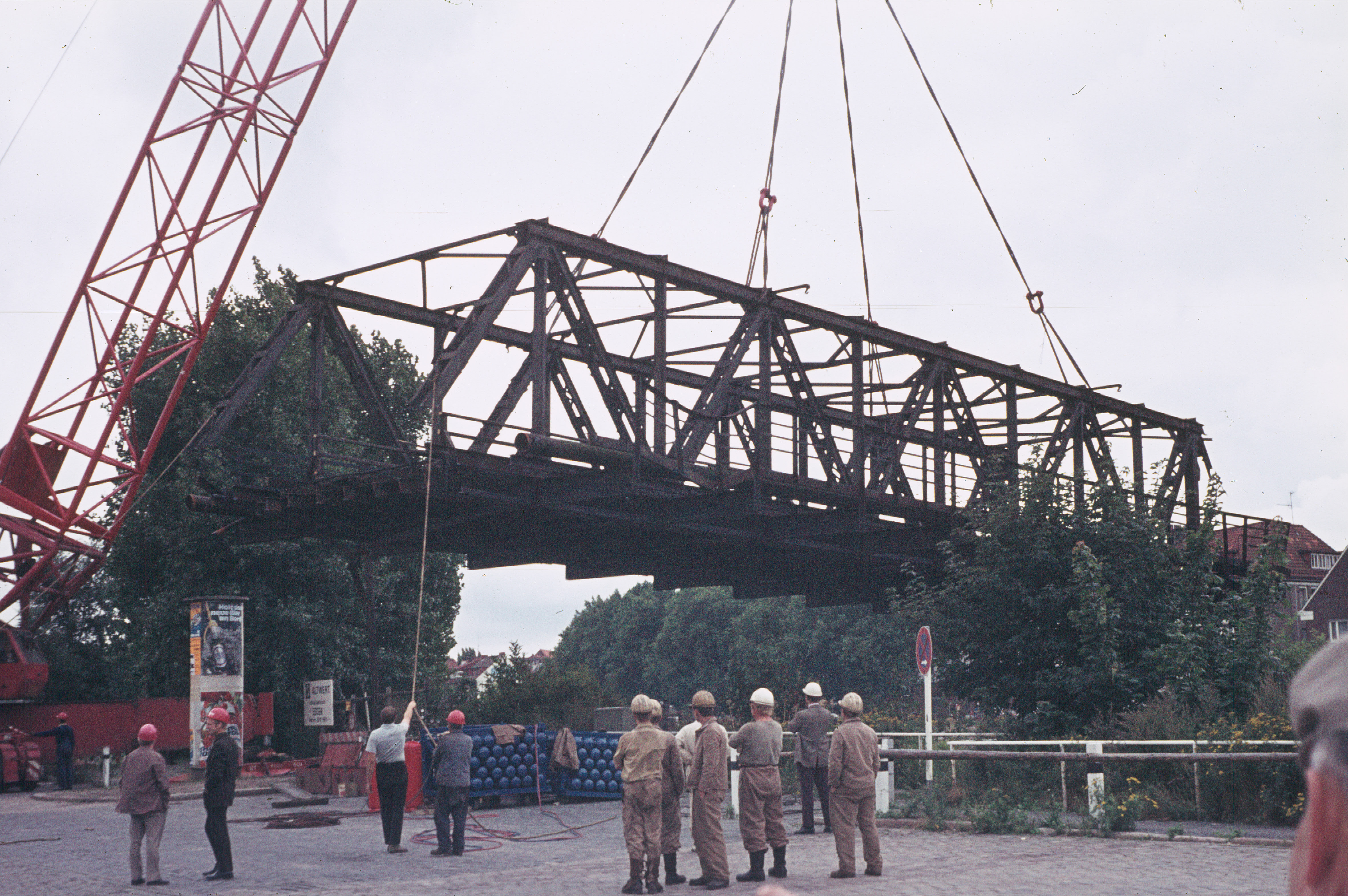 Abrissarbeiten an der Brautbrücke in Bremen